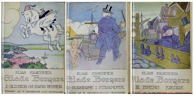 Book covers: Anthon Bernhard Elias Nilsen: Glade borgere